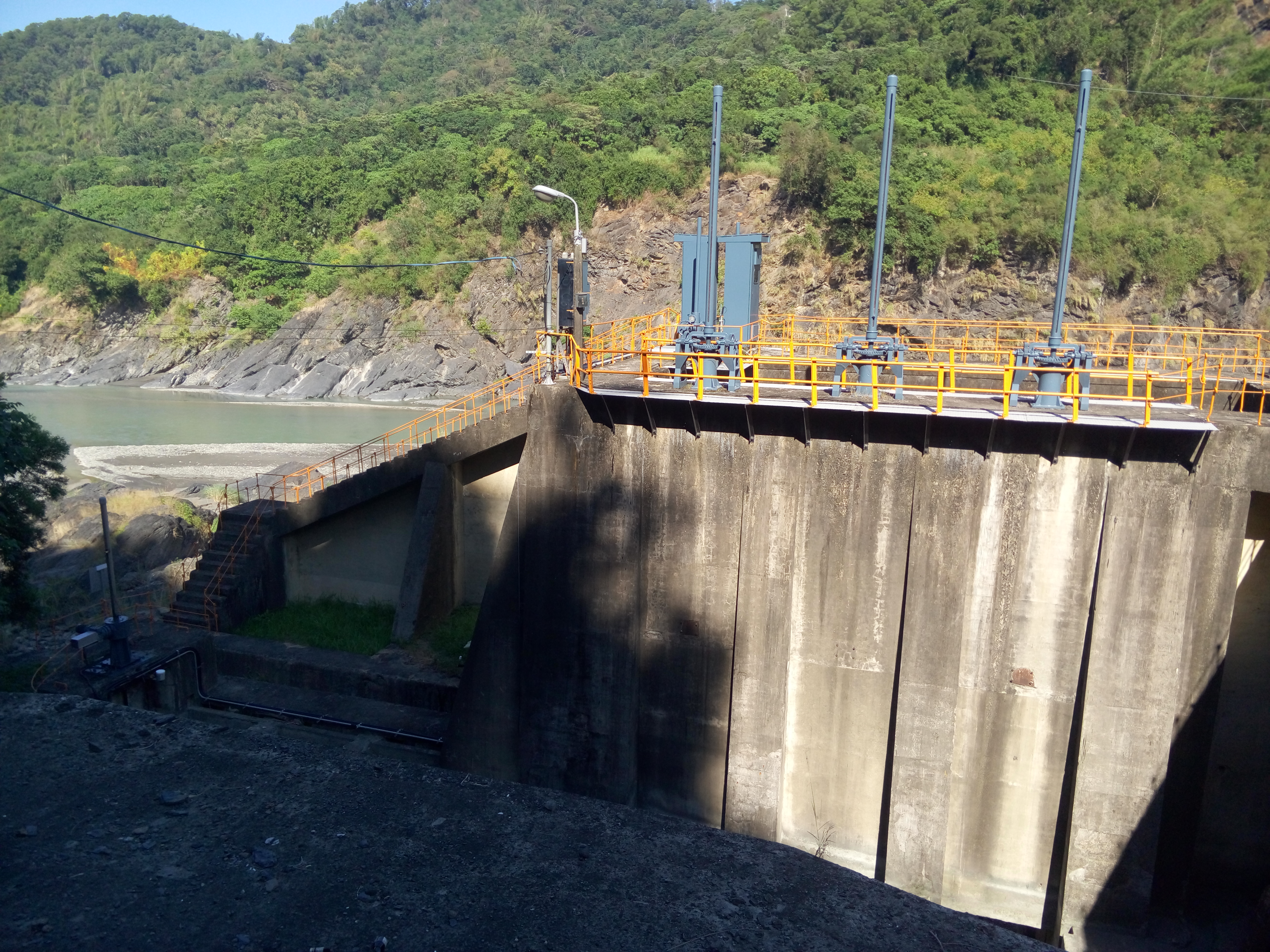 臺灣電力公司高屏發電廠六龜機組